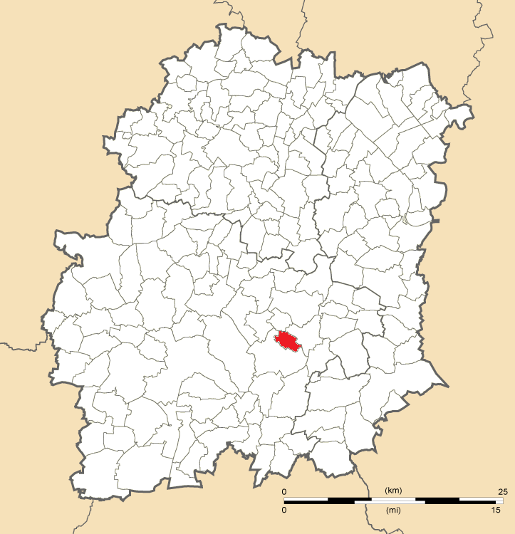 Carte de position d'Orveau en Essonne (91)